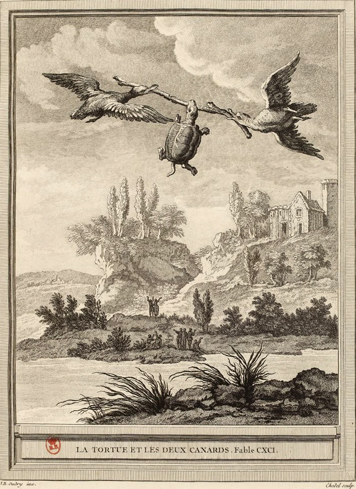 Gravure réalisée par Pierre Quentin Chedel d'après un dessin de Jean-Baptiste Oudry représentant la fable La tortue et les deux canards de Jean de La Fontaine (fable 2 du livre X). Cette gravure est parue dans l'édition complète des fables de La Fontaine, parue en quatre tomes chez l'éditeur Desaint & Saillant, rue saint Jean de Beauvais à Paris, 1755-1759.